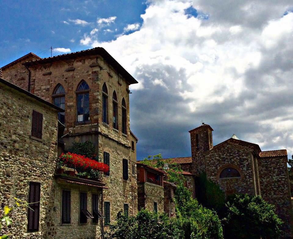 Abitazioni lungo Via Tiberina, absidi e campanile della Collegiata, foto Matteo Venturi